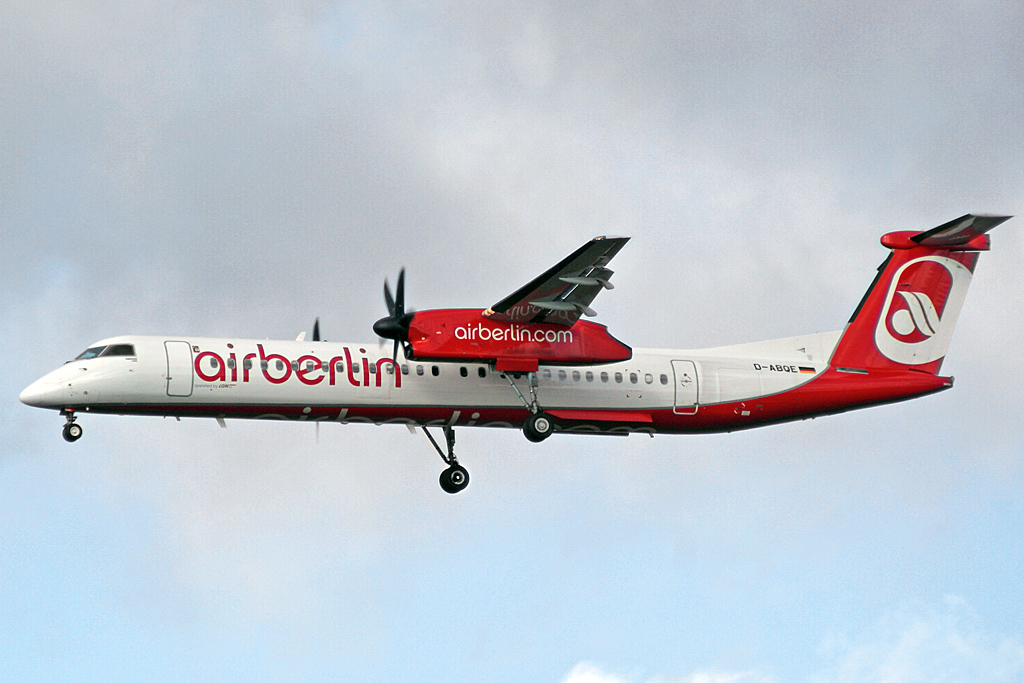 Air Berlin D-ABQE